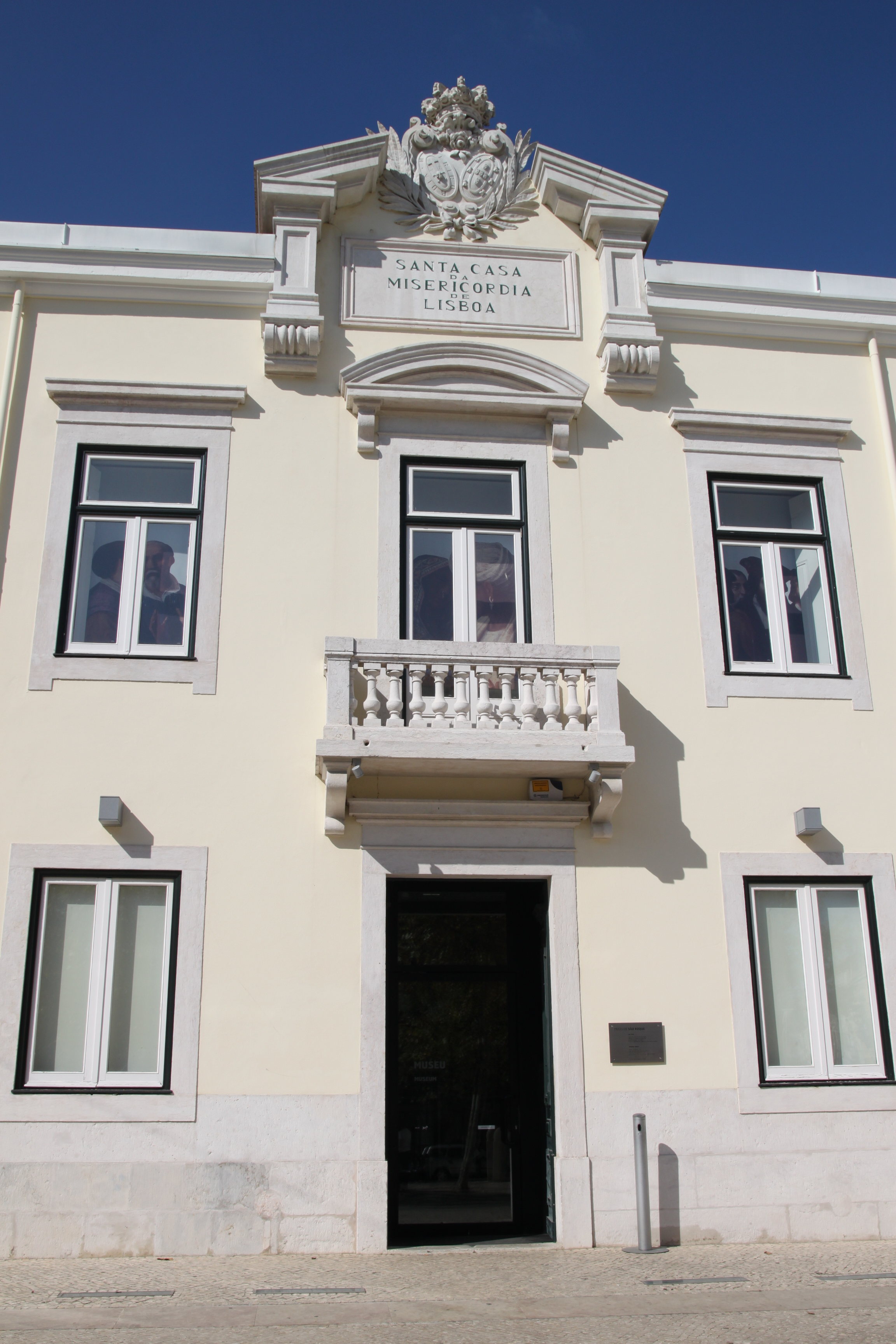 Quiosques e monumentos escultóricos no Largo Trindade Coelho This file was uploaded for Wiki Loves Monuments in Portugal with the unique identifier 97026939.